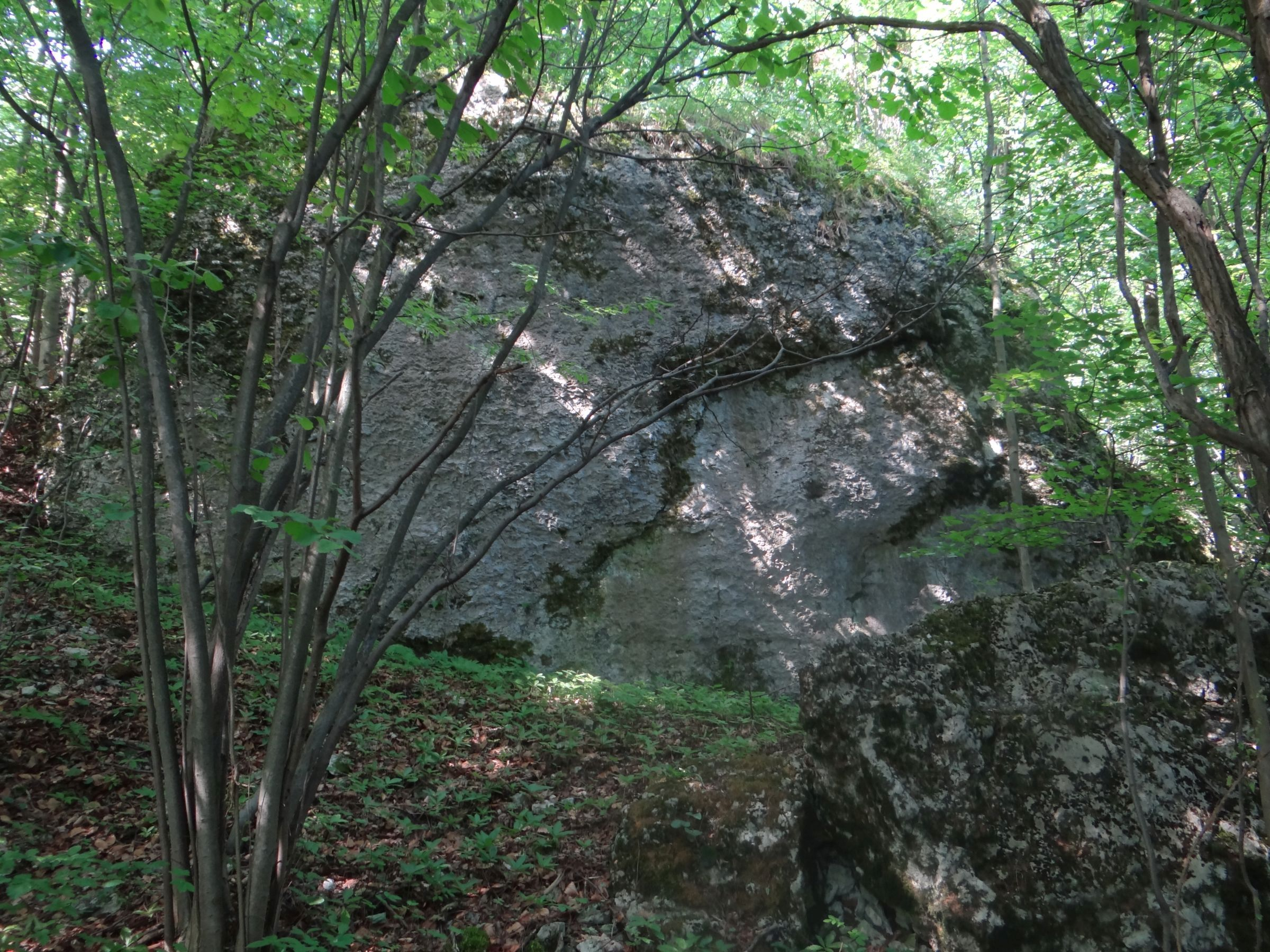 Skałki na wzgórzu Pański Kierz w Ryczowie